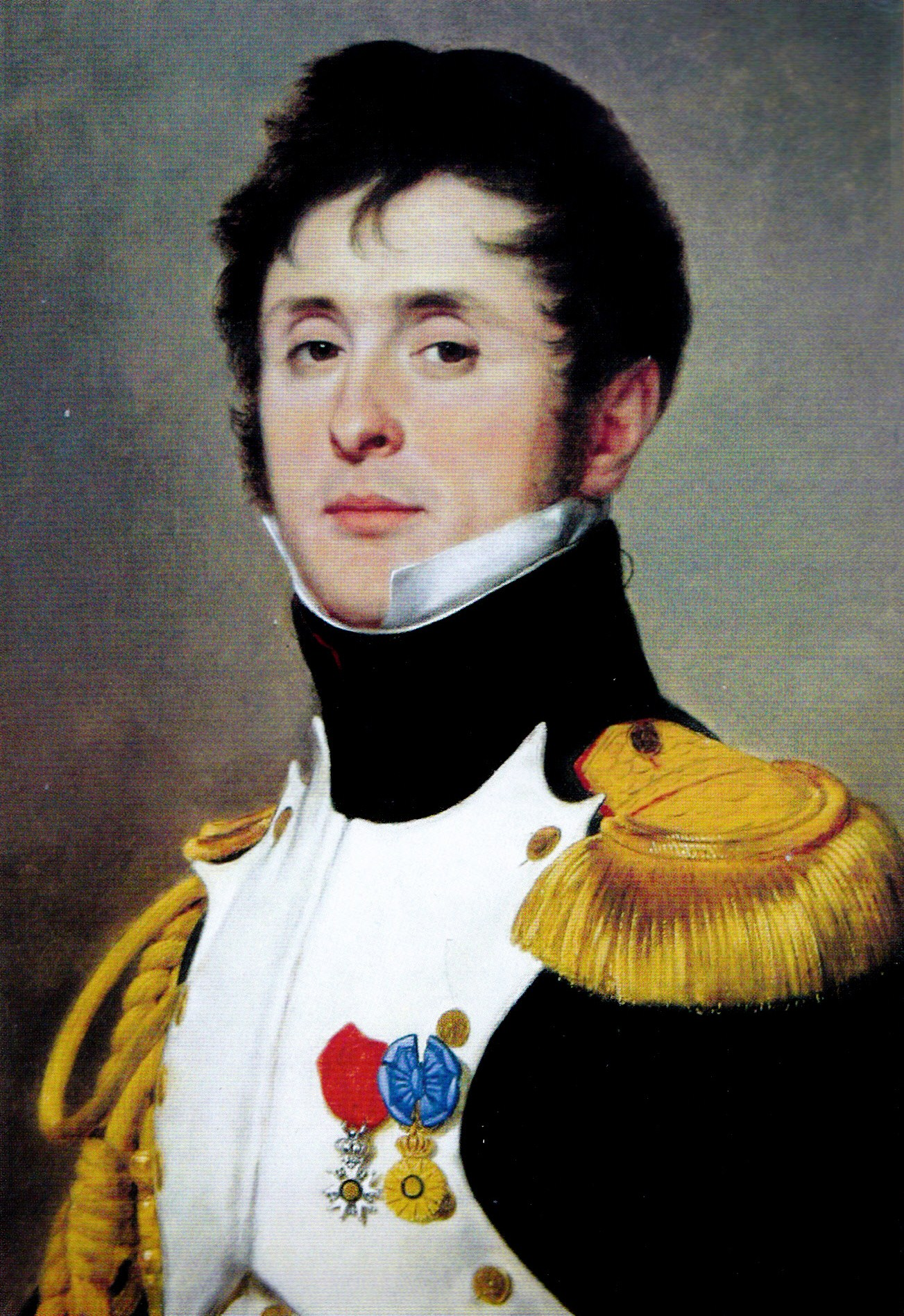 Portrait de Landry de Saint-Aubin, lieutenant en premier des dragons de la Garde impériale. Il porte ici sa croix de la Légion d'honneur ainsi que celle de l'Ordre de la Réunion.